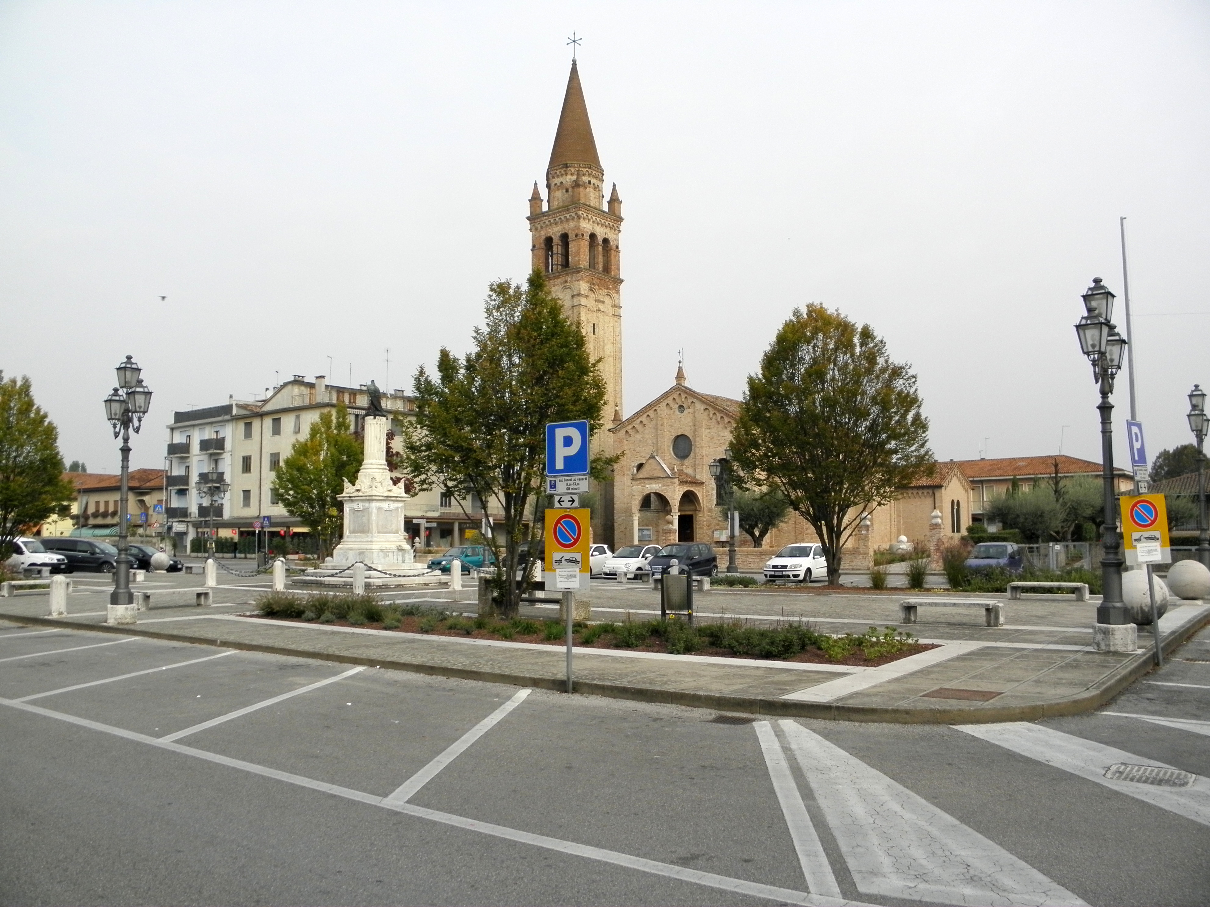 Pianiga, Piazza san Martino.